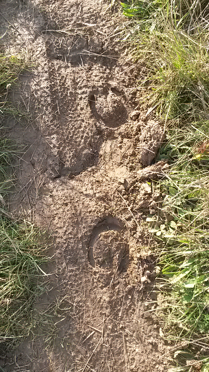 Radotínské údolí je oblíbené místo pro jezdce na koních a cyklisty